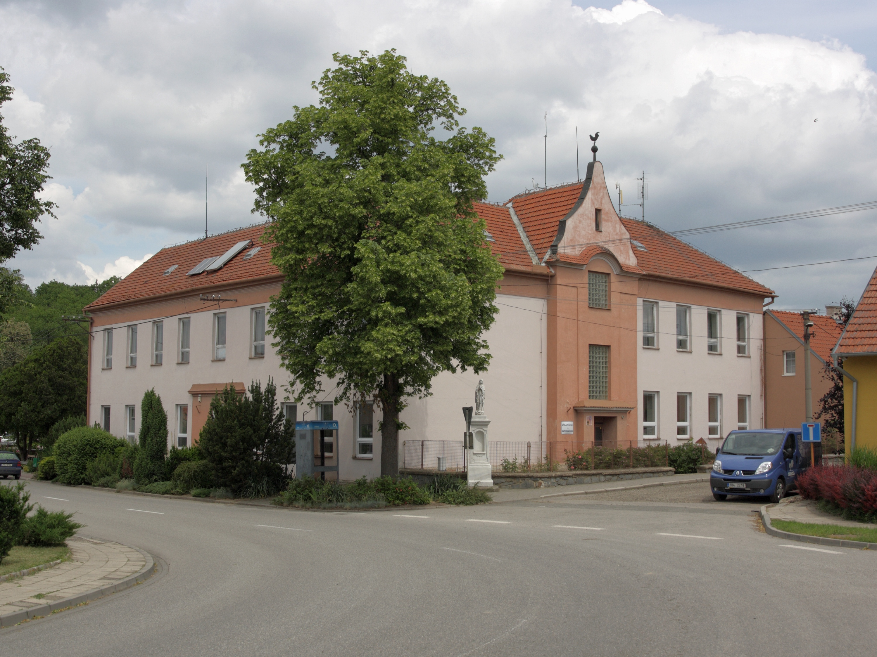 Vážany nad Litavou - základní škola.